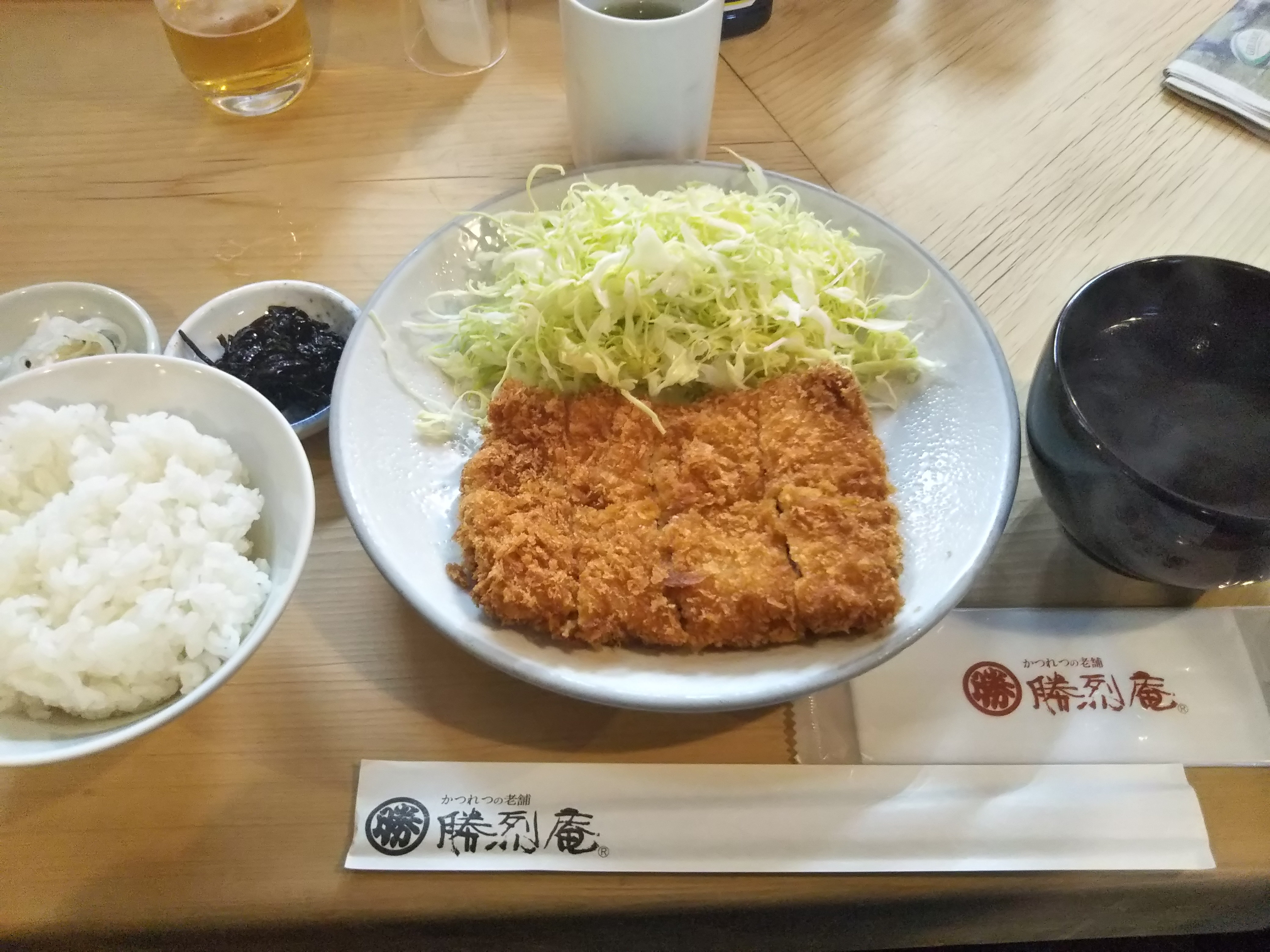 横浜市中区常盤町、勝烈庵馬車道総本店の勝烈定食